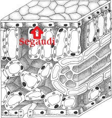 Lapas uzbūve ar segaudiem